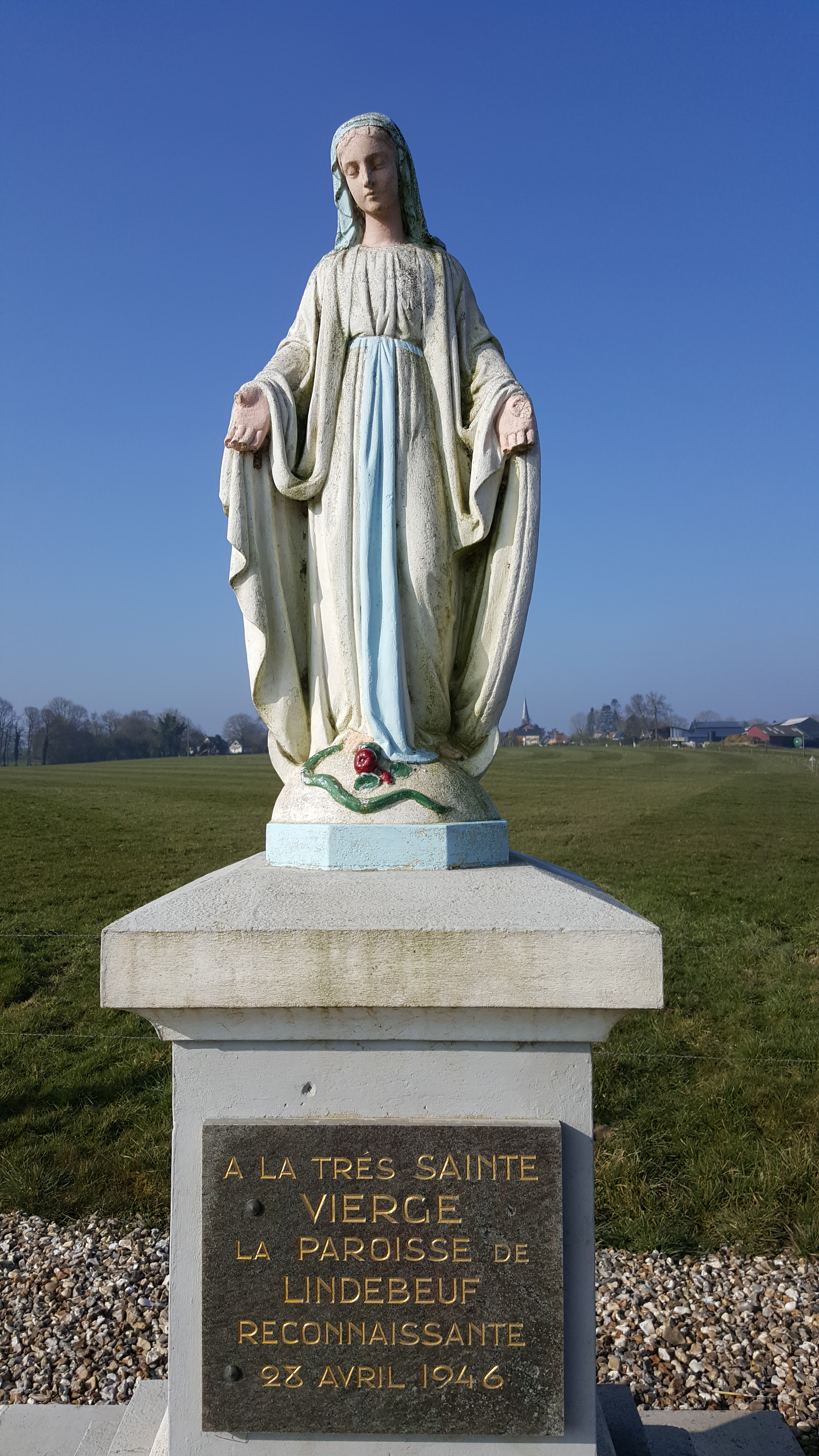 La très sainte vierge. La paroisse de Lindebeuf reconnaissante. 28 avril 1946